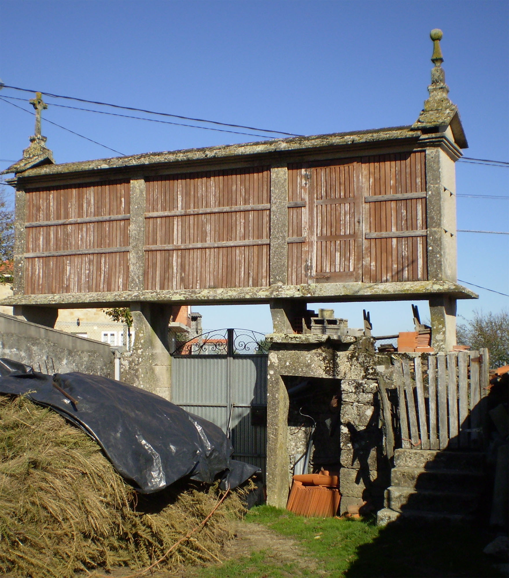 Hórreo de tipo mahía, de tres claros e con cuberta de lousas de canteiría. Adornado con cruz celta e lampión fusiforme. Este esvelto e ben coidado exemplar, aséntase en catro cepas sobre o muro que cerca o curral da propiedade, incluso a portada de acceso con carro está por debaixo do propio hórreo. As escaleiras de acceso por un dos laterais foron construídas en elaborada canteiría que conforman un pequeno celeiro baixo das mesmas. Ubícase no lugar de Lebesende (Antas de Ulla)